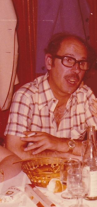 Una foto che ritrae l'attore Euro Bulfoni nel 1977